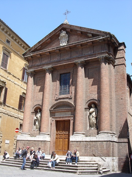 Siena - Chiesa di S. Cristoforo